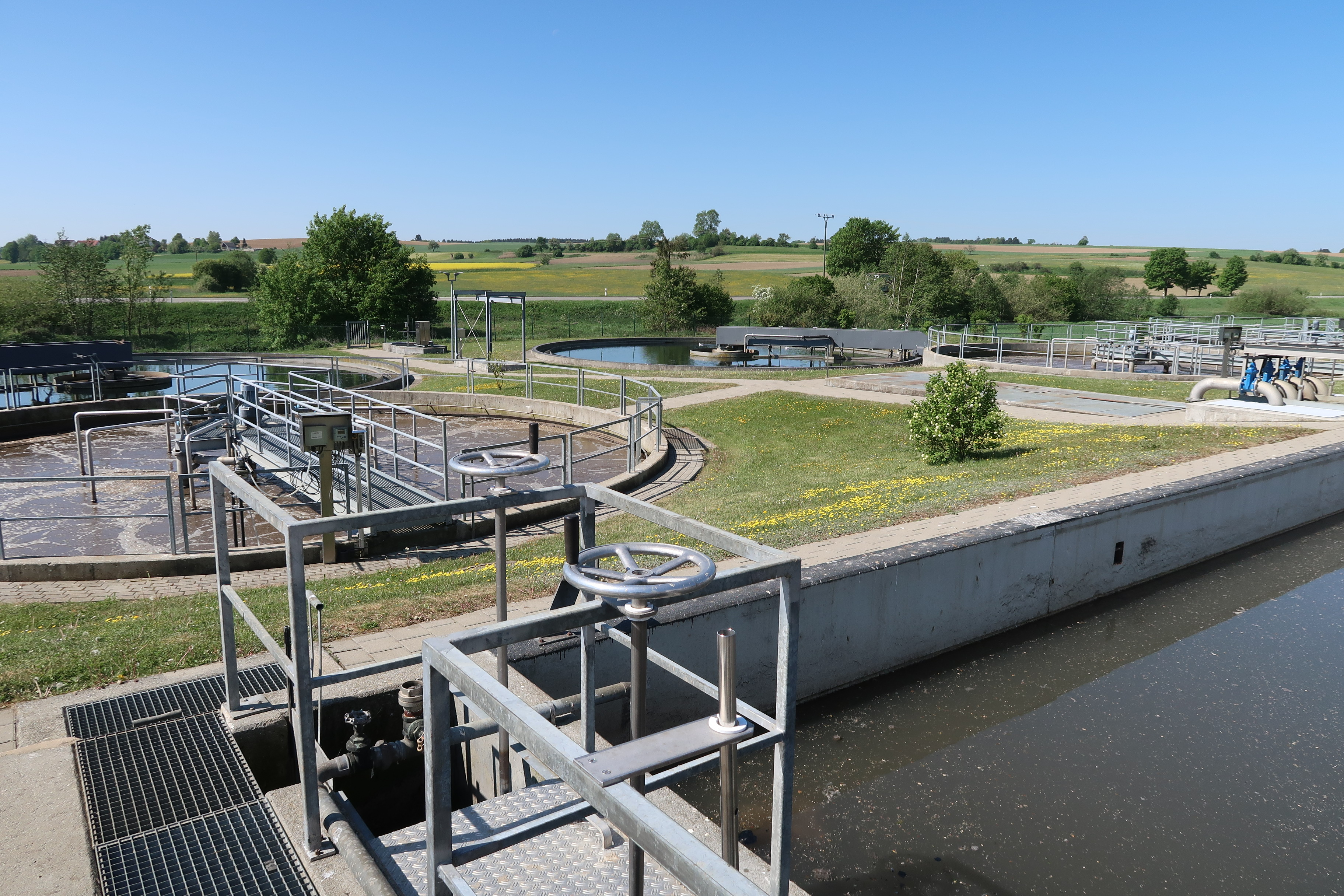 Deutschland (D) - Baden-Württemberg (BW) - Landkreis Sigmaringen (SIG) - Meßkirch - Menningen: Kläranlage